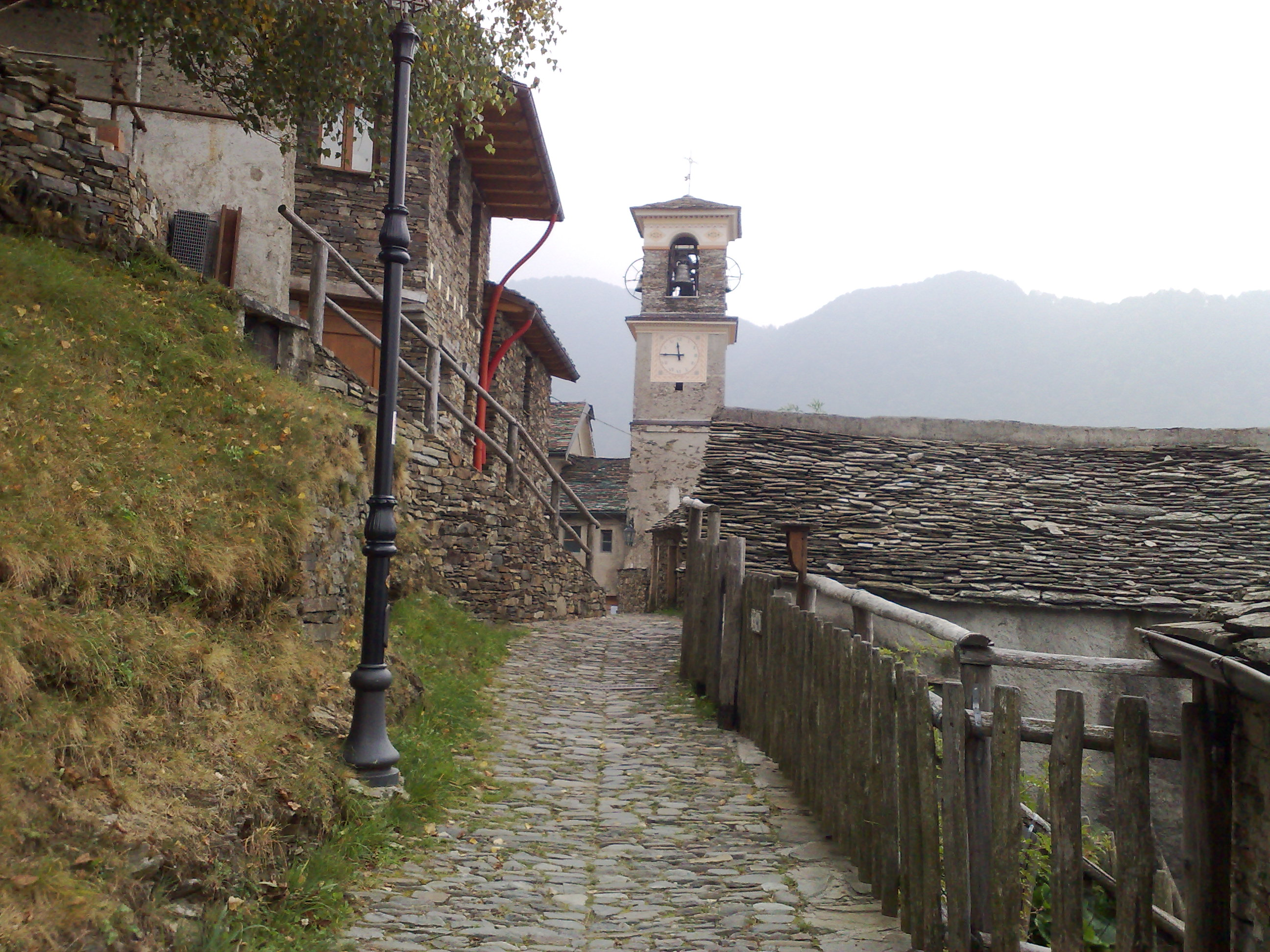 Strada nella frazione di Monteviasco, raggiungibile solo in funivia o a piedi per mezzo di una ripida mulattiera.